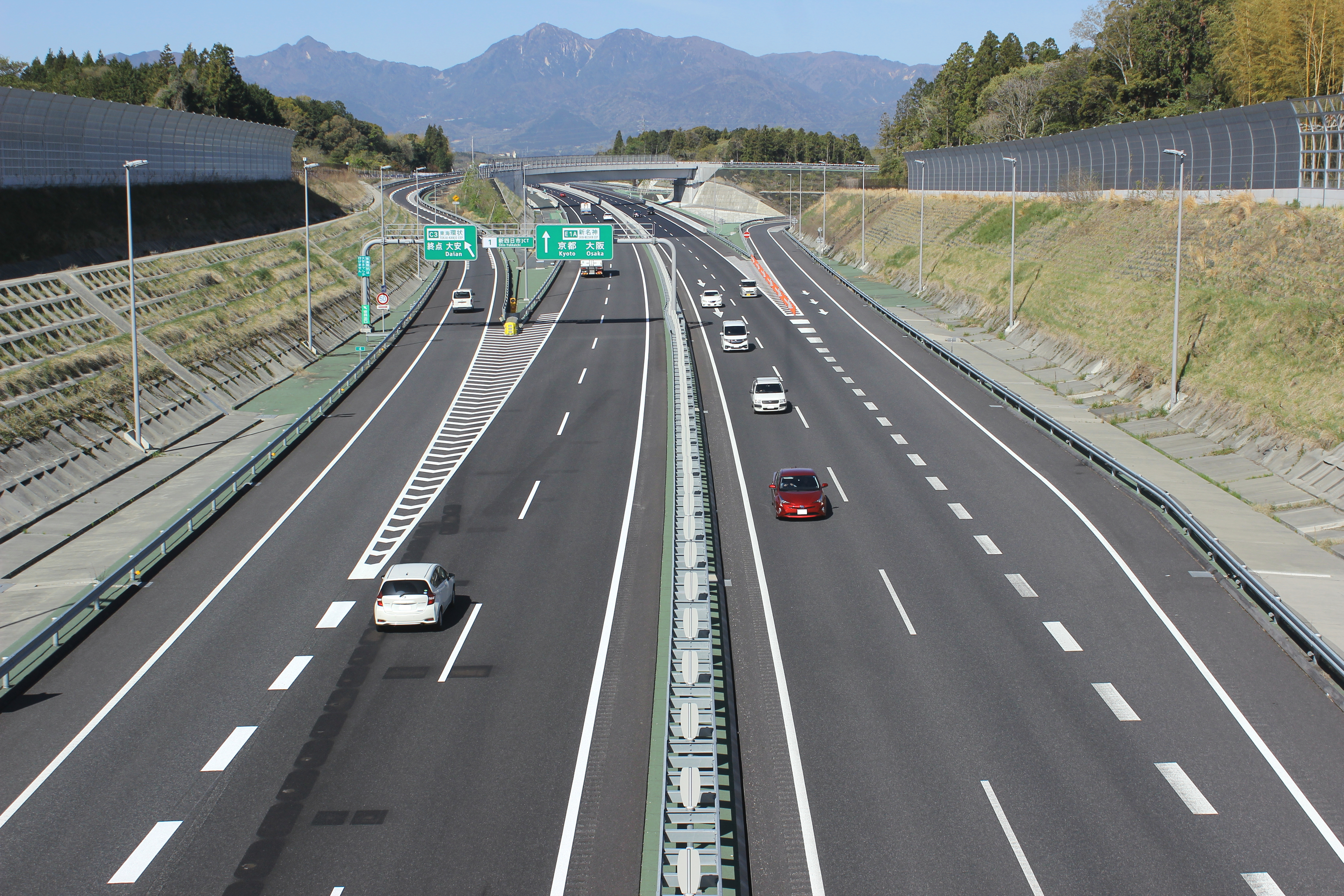 新四日市ジャンクションを筆ヶ崎橋から見る